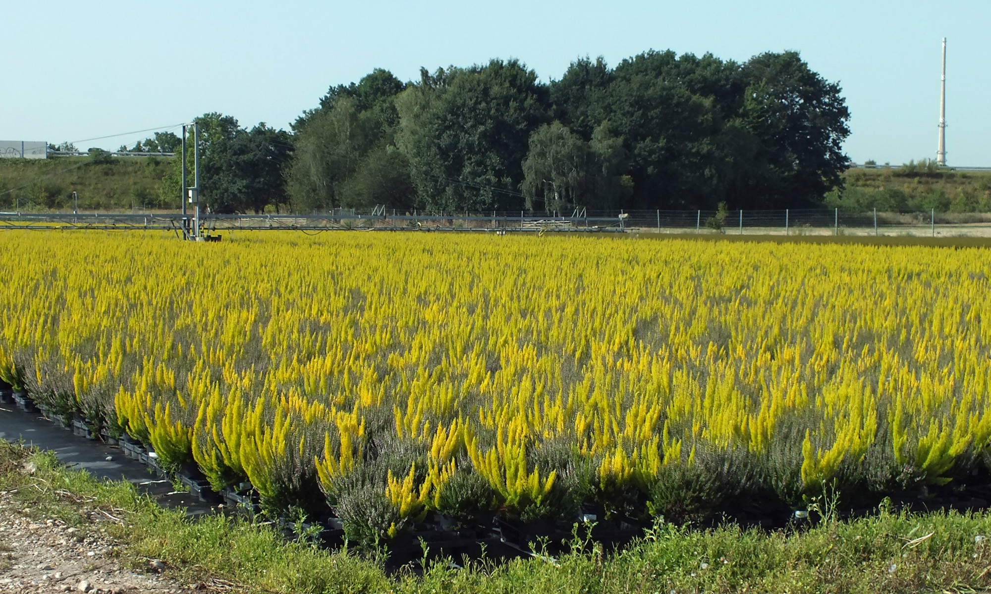 Moorbeetkultur in Leipzig-Hartmannsdorf